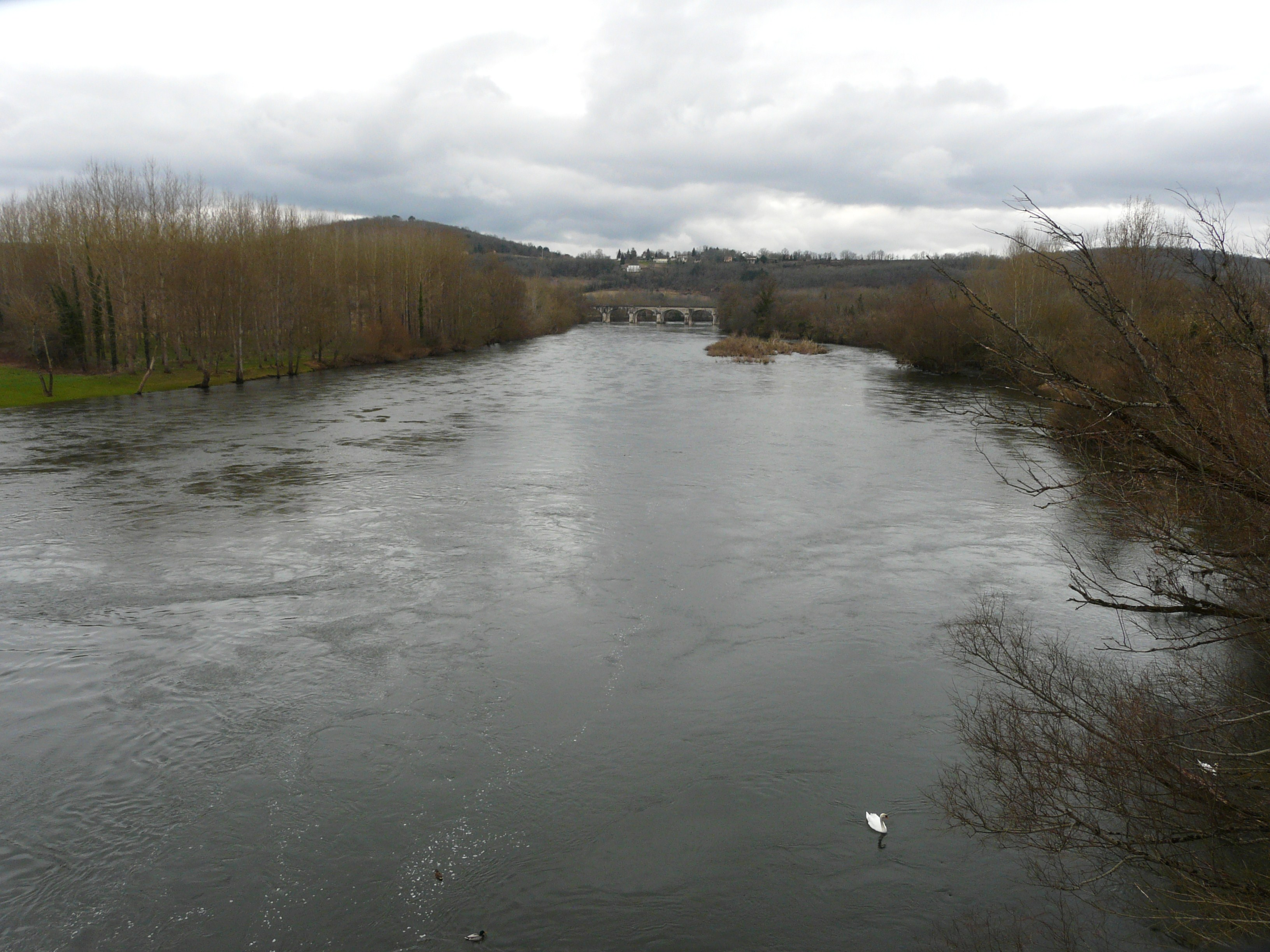 La Dordogne, en aval du pont de Vic, marque la limite entre Le Buisson-de-Cadouin (à gauche) et Saint-Chamassy ; Dordogne, France. Au fond, le viaduc ferroviaire de Vic.